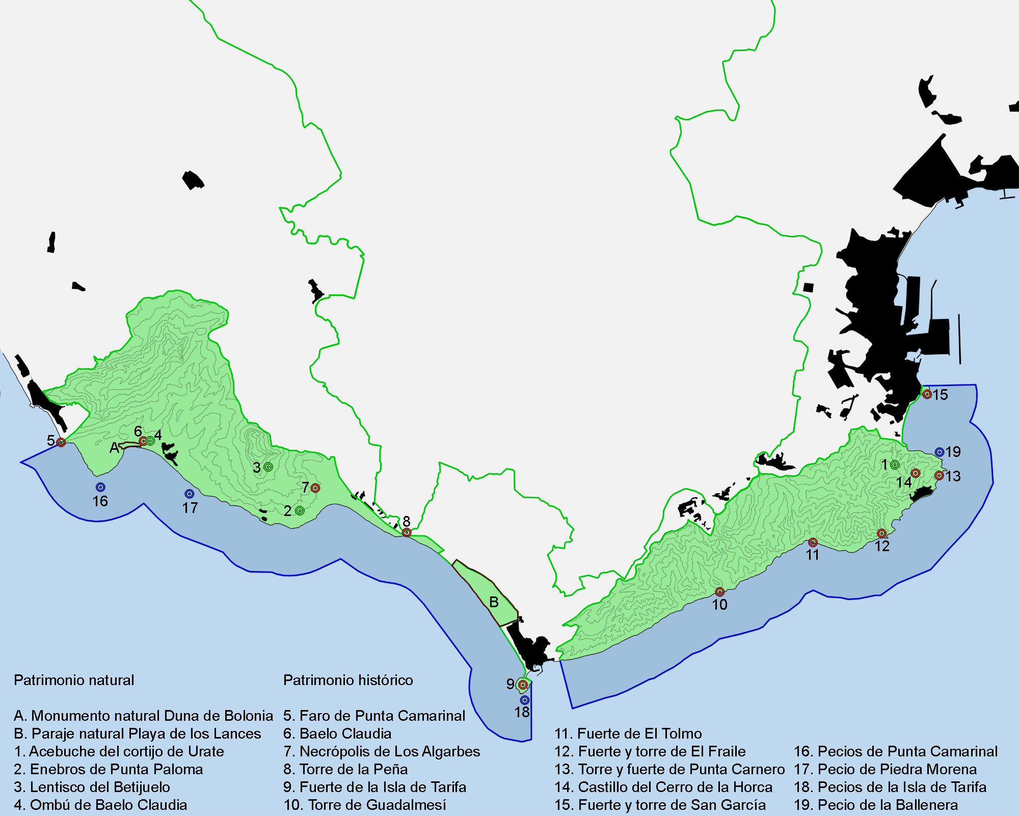 Mapa del patrimonio histórico y natural del Parque natural del Estrecho.